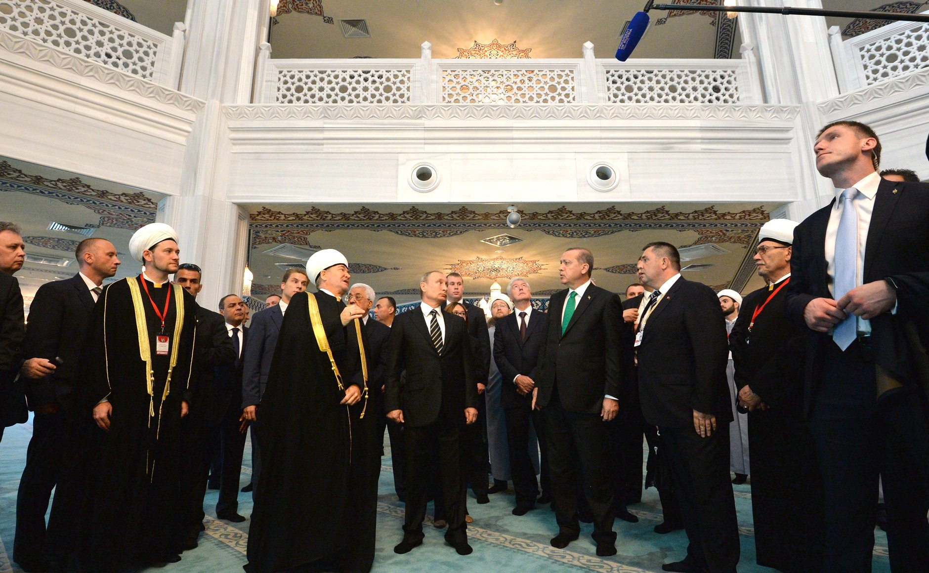 Открытие нового комплекса Московской соборной мечети. В ходе осмотра Московской соборной мечети, открытой после реконструкции.